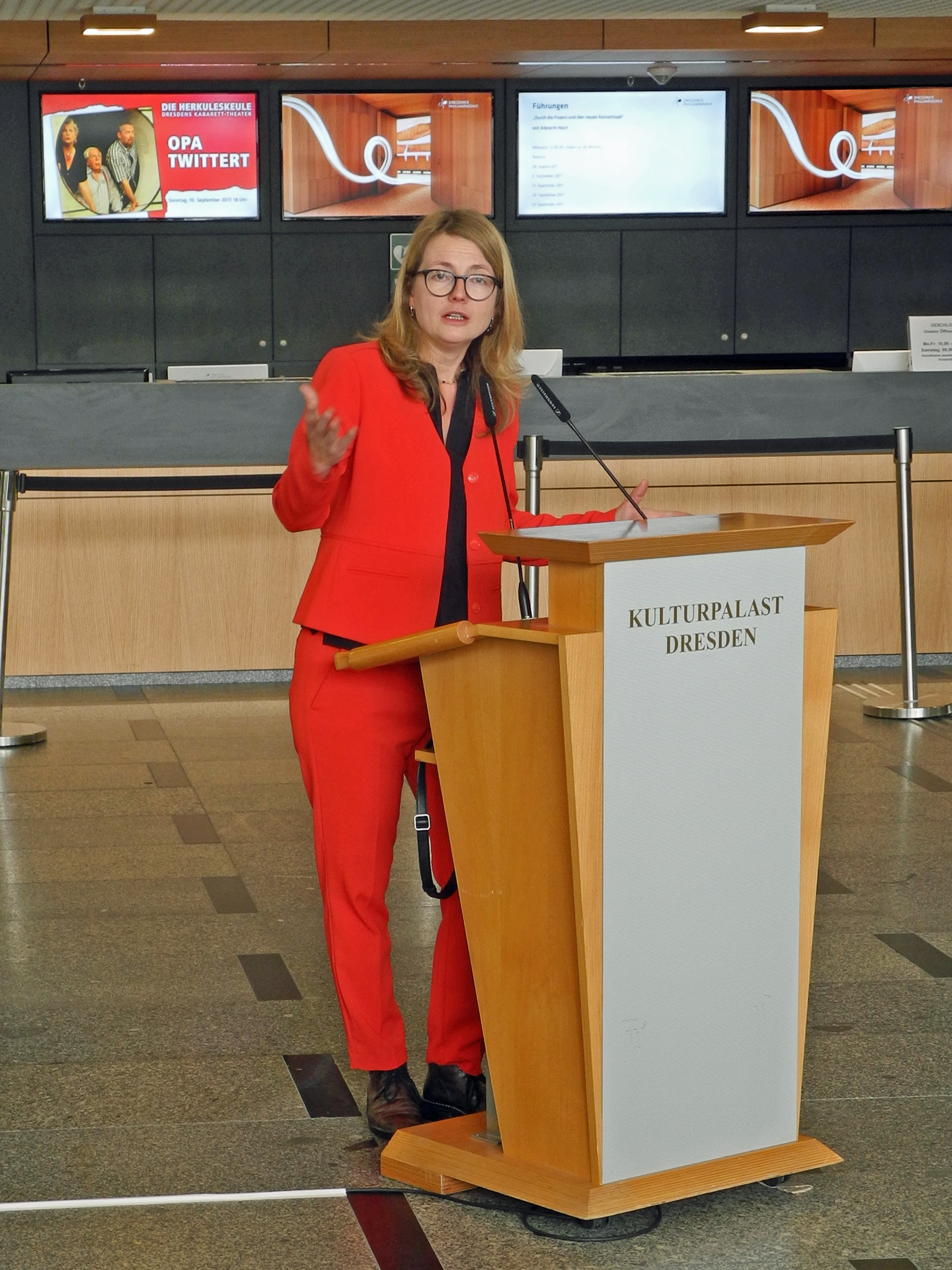 Tag des offenen Denkmals 2017 in Dresden – Eröffnung im Foyer des Kulturpalastes mit Annekatrin Klepsch (Kulturbürgermeisterin)